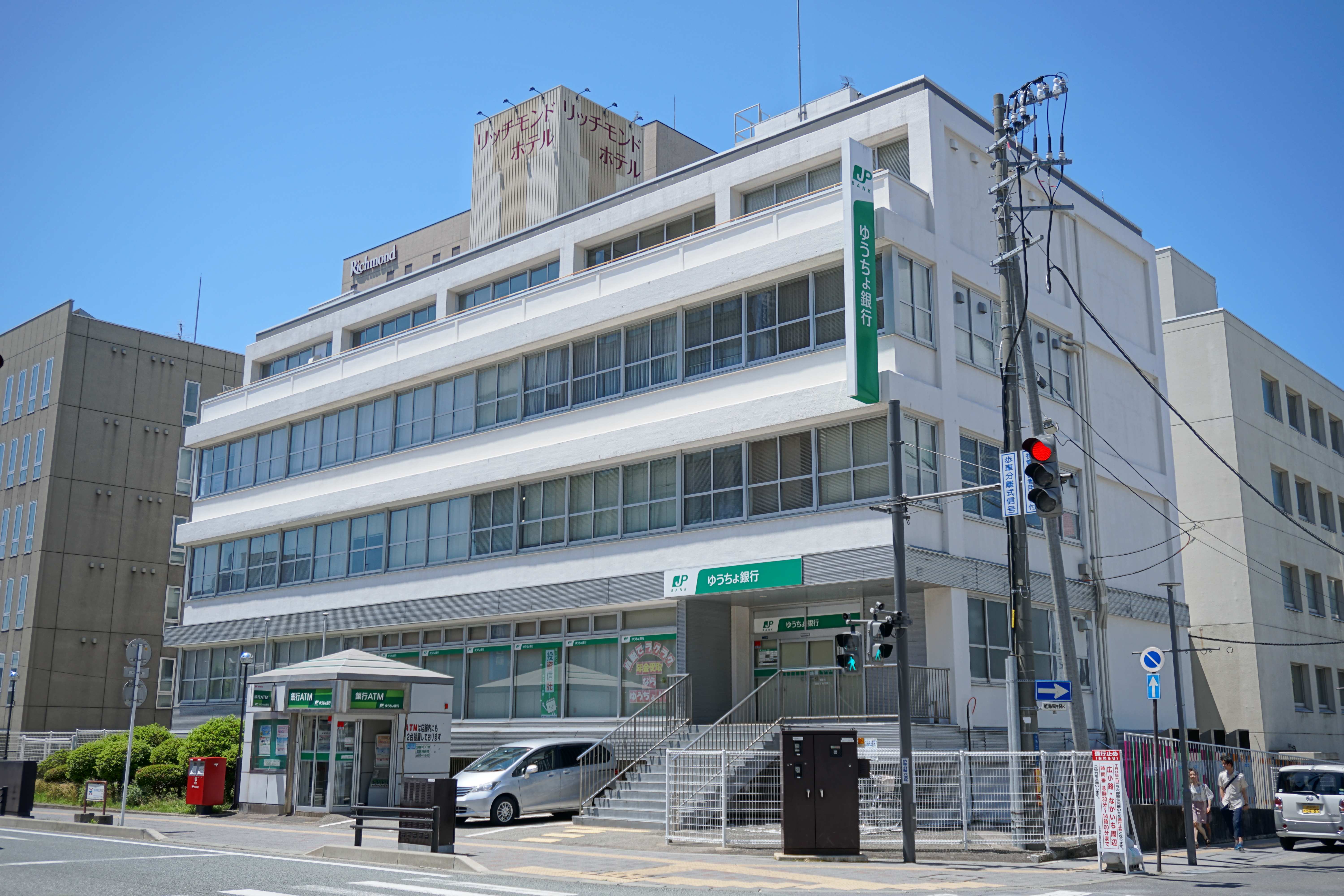 ゆうちょ銀行仙台支店秋田出張所（秋田市中通）。全国で数少ない、郵便局を併設しないゆうちょ銀行単独の営業拠点である。